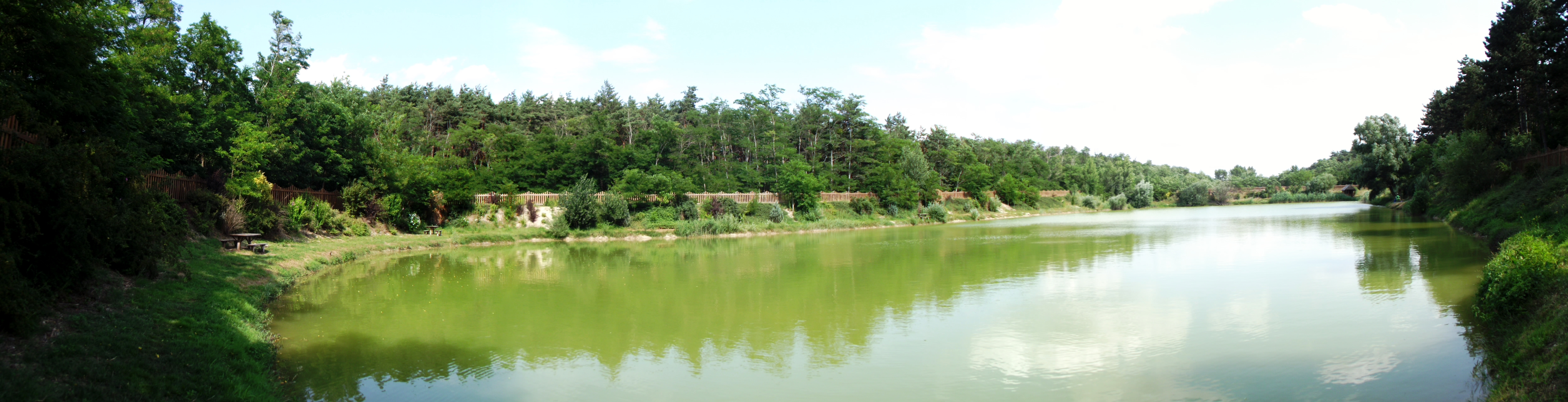 Mórichida határában található a Kaszalapi-tó. Bányató ként alakult ki. Sokáig rendezetlen volt, de napjainkban a Marcal menti horgászegyesület horgásztó ként használja. Fürdésre nem használható. Túrázásnál kikapcsolódásra, megpihenésre viszont használható. A tó a mórichidai Hegy utca felől közelíthető meg egy földúton, mely északi irányba tart. A tavat akác és fenyőerdők ölelik körbe.